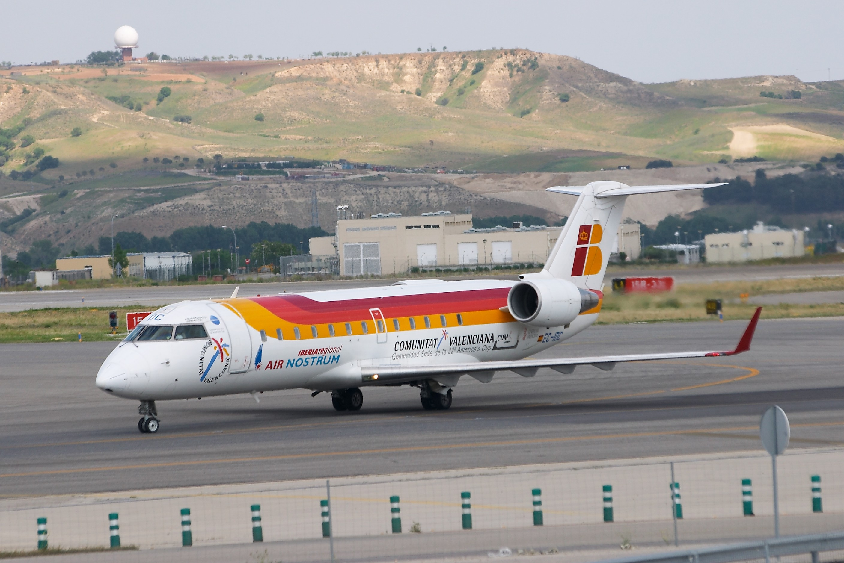 Canadair CL-600-2B19 Regional Jet CRJ-200ER de Air Nostrum. Aeropuerto de Madrid Barajas.